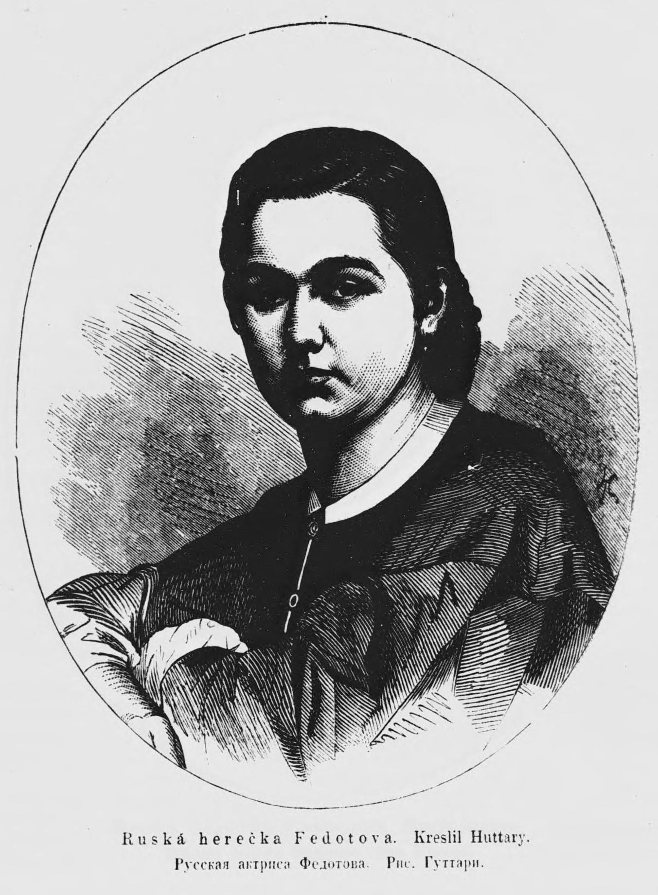 Portrait of Glikeria Nikolayevna Fedotova (Russian: Гликерия Николаевна Федотова, 1846 - 1925), Russian actress